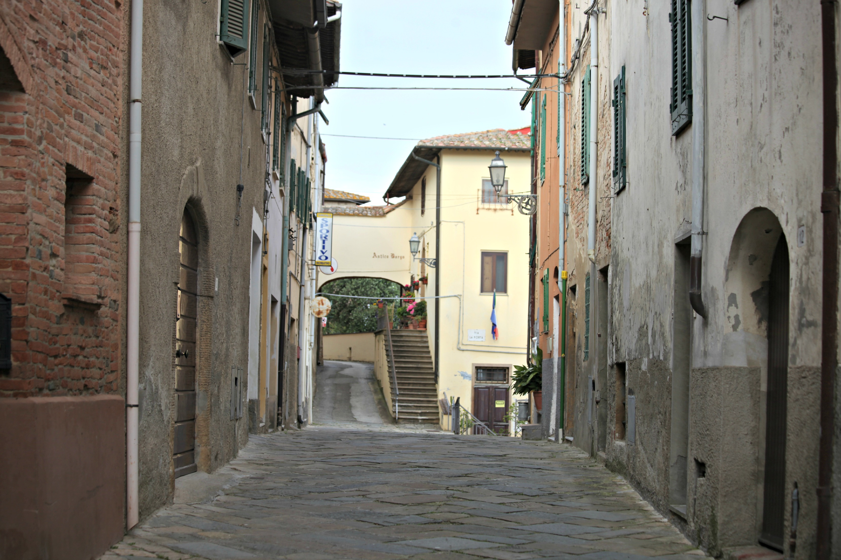 Treggiaia, 1